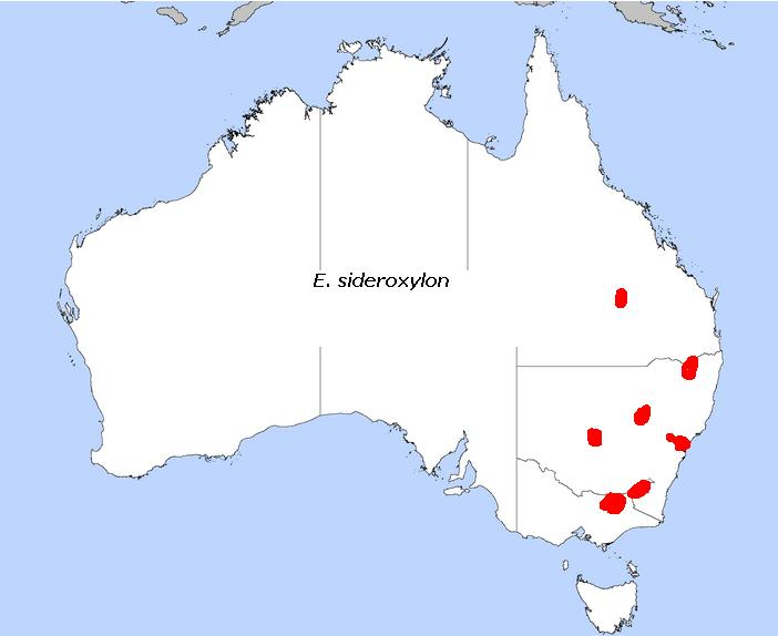 Carte de distribution d'Eucalyptus sideroxylon